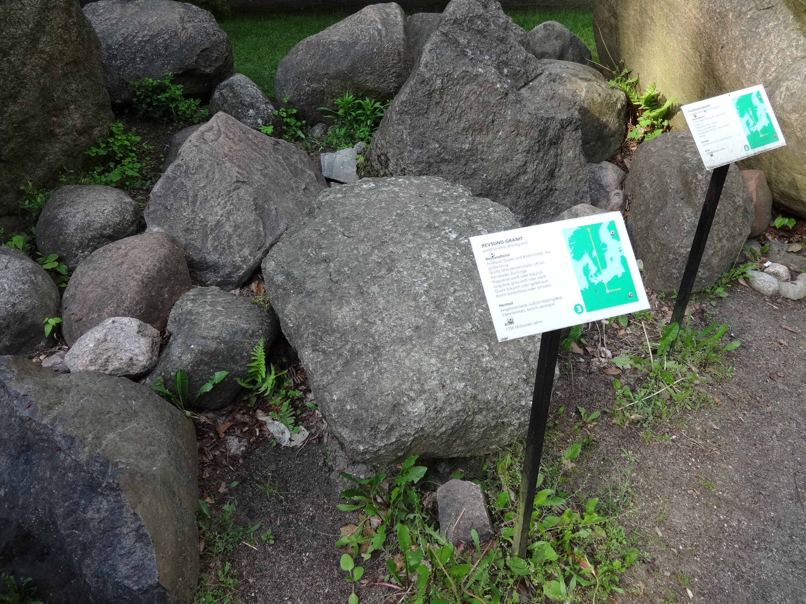 Eiszeitgarten Buckow (Märkische Schweiz) - eine gärtnerische Darstellung der eiszeitlich geprägten Landschaft um Buckow, gelegen im Lunapark an der Buckowseepromenade in Buckow